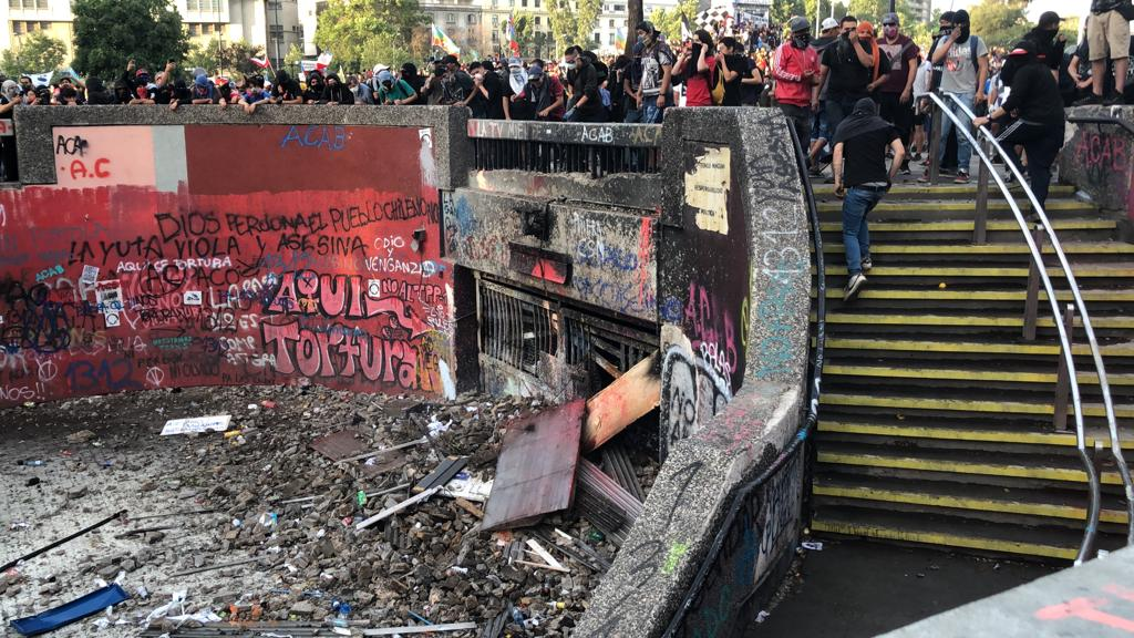 Salida B de la estación Baquedano del Metro de Santiago, destrozada por las protestas ocurridas durante el mes de octubre de 2019. Fotografía obtenida el día viernes, a las 18 hrs aproximadamente.